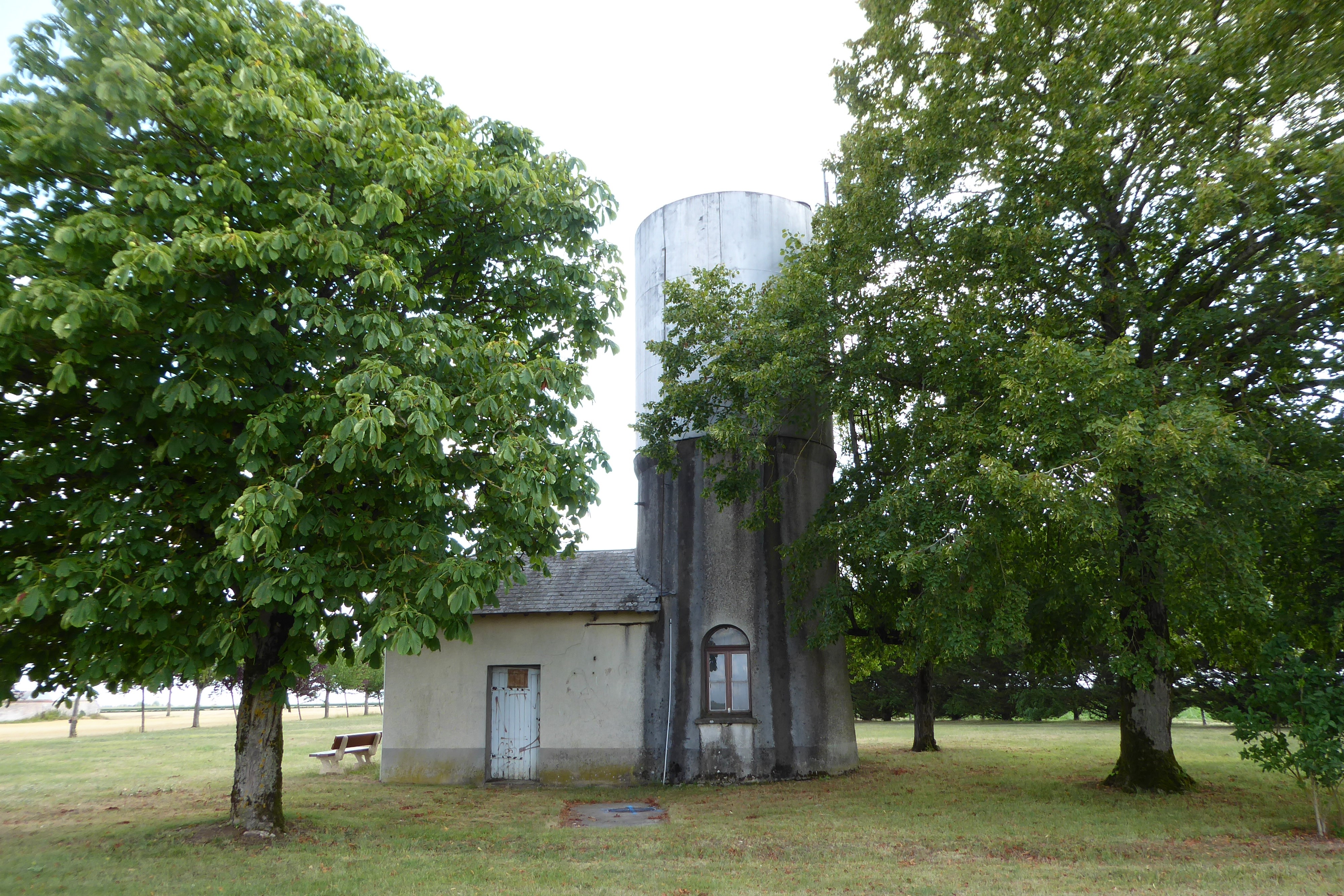 ancien château d'eau d'Intréville, Eure-et-Loir, France.